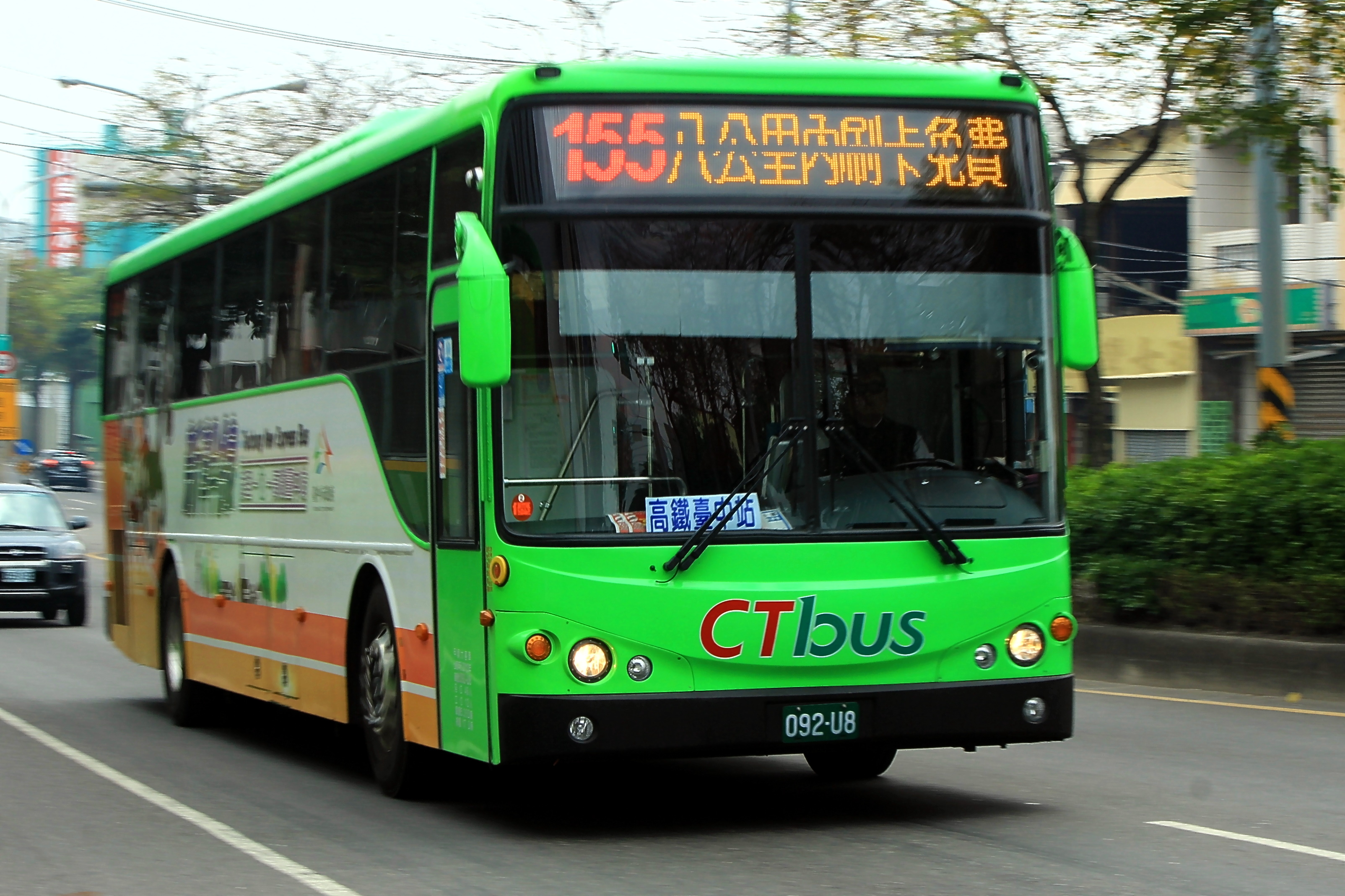 中台灣客運高金龍092-U8 台中市公車155路 正隆紙廠附近